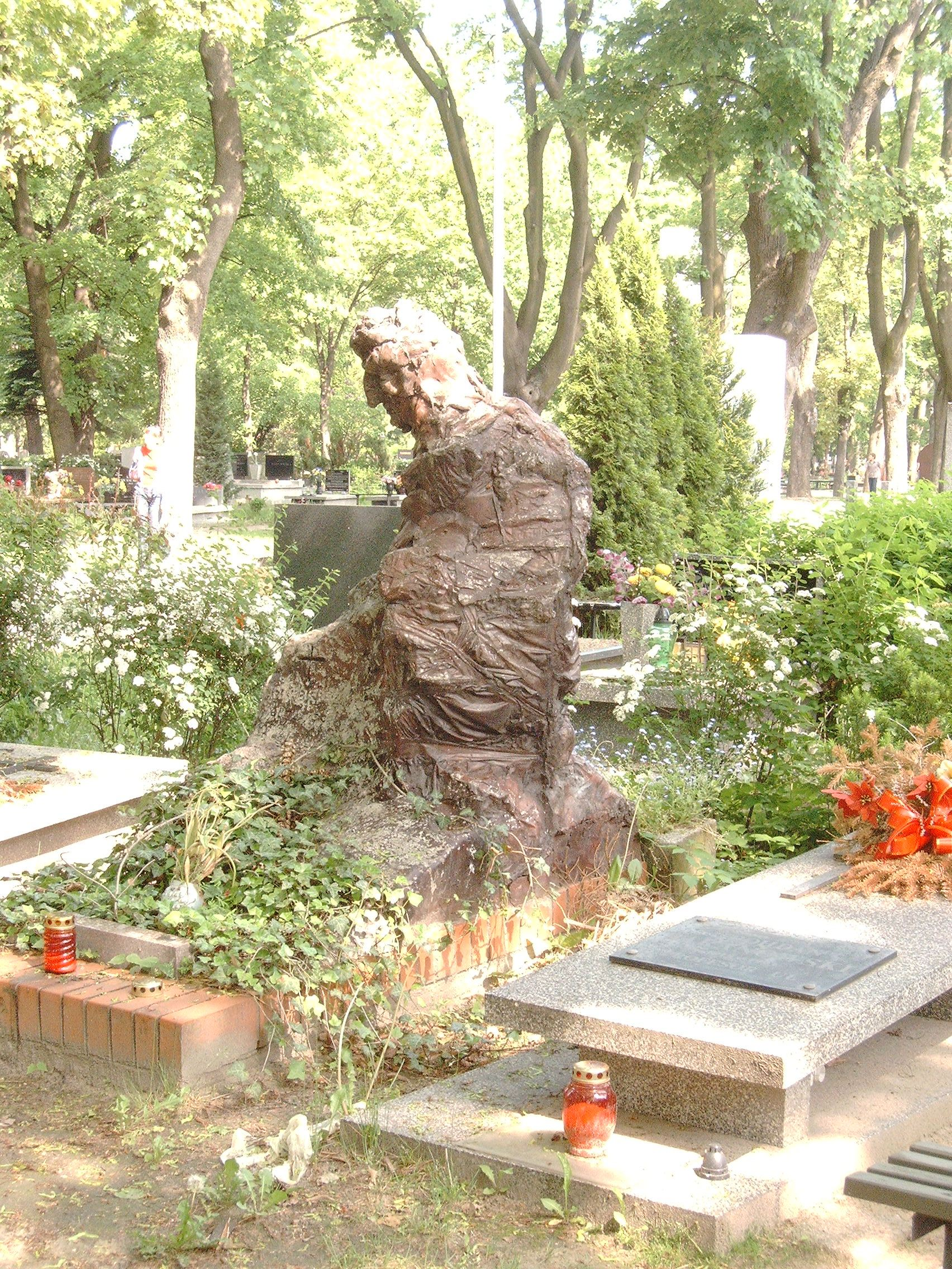 Grób Jacka Bierezina na komunalnym cmentarzu na Dołach w Łodzi